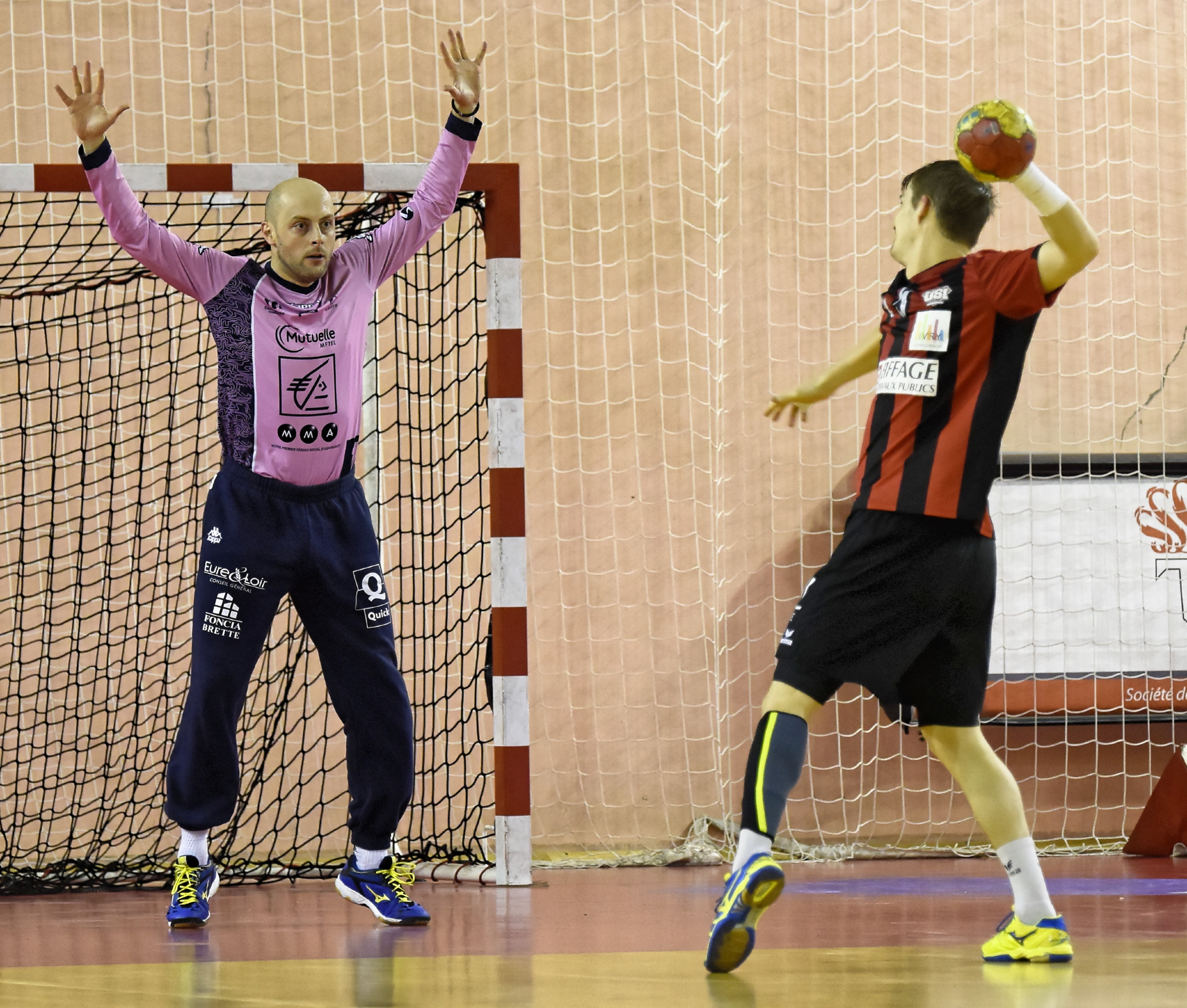 Rencontre de ProD2 entre l'US Ivry handball et Chartres HB. A Ivry, le 06 décembre 2014.